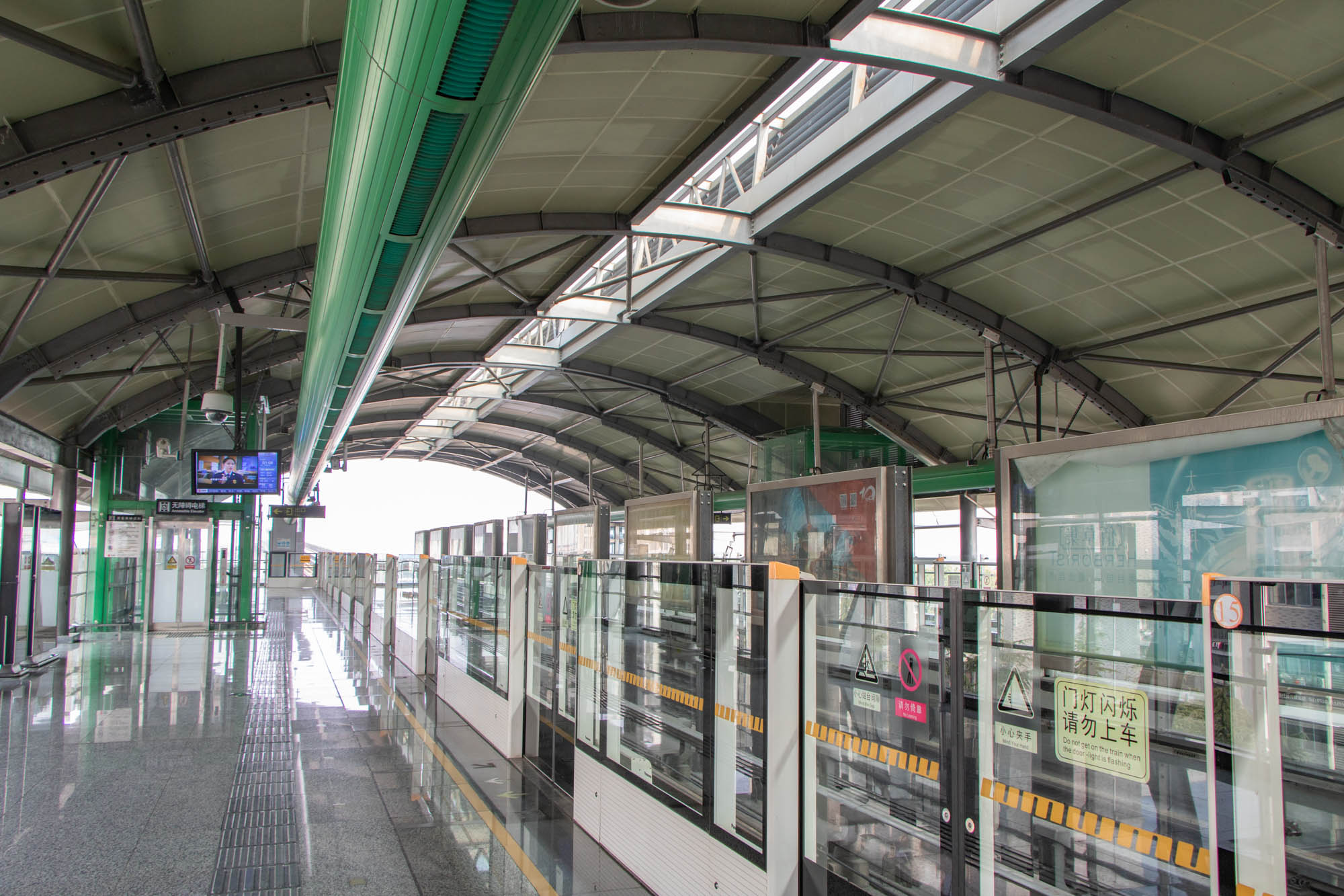 中文（中国大陆）: 无锡轨道交通2号线庄桥站站台